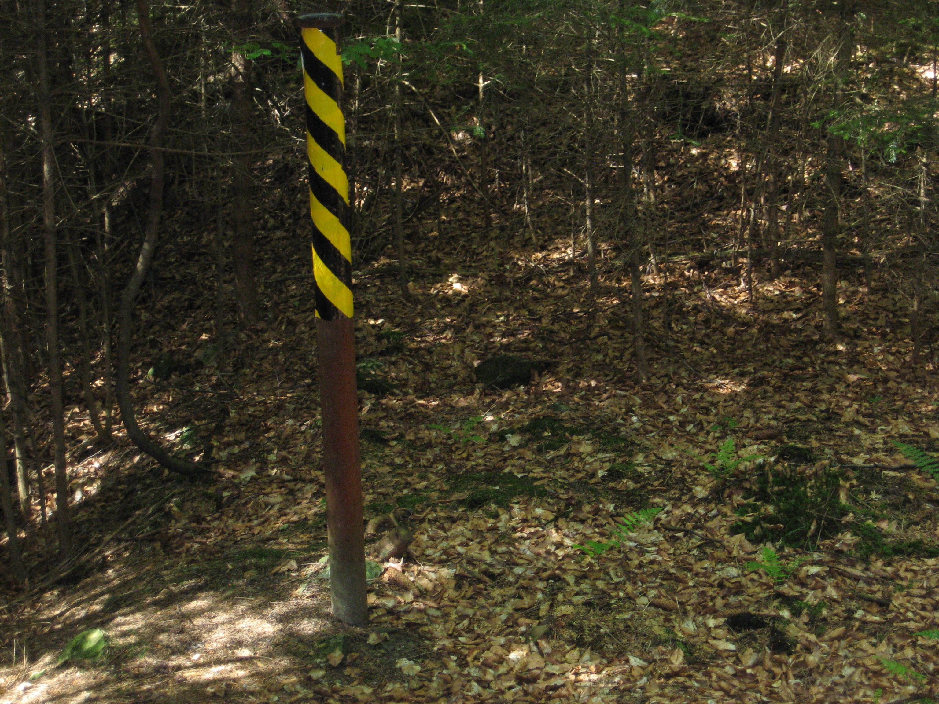 Standort des Schachtes der Grube Marie, Wilnsdorf, NRW (DE).